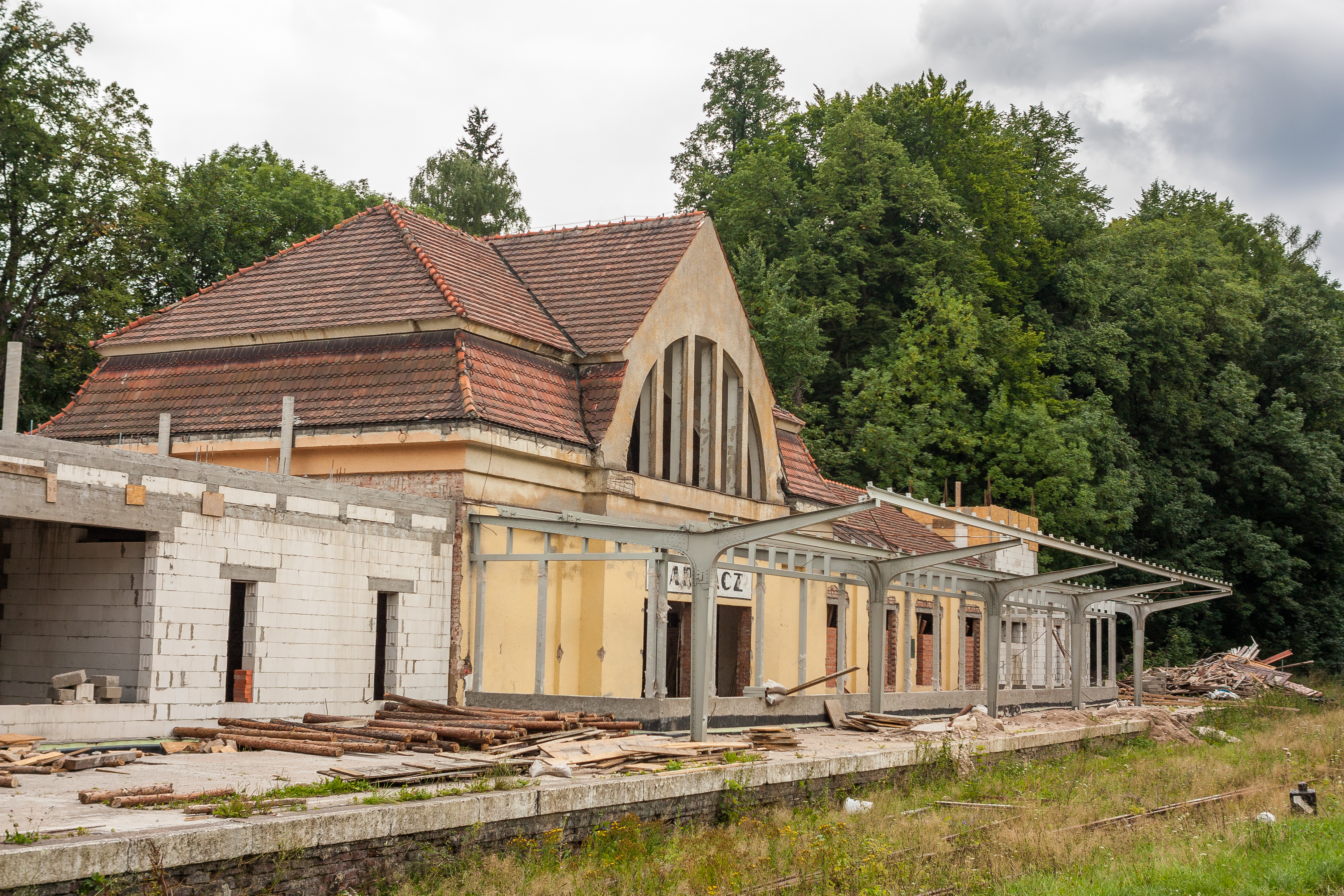 Nieczynna stacja kolejowa w Karpaczu